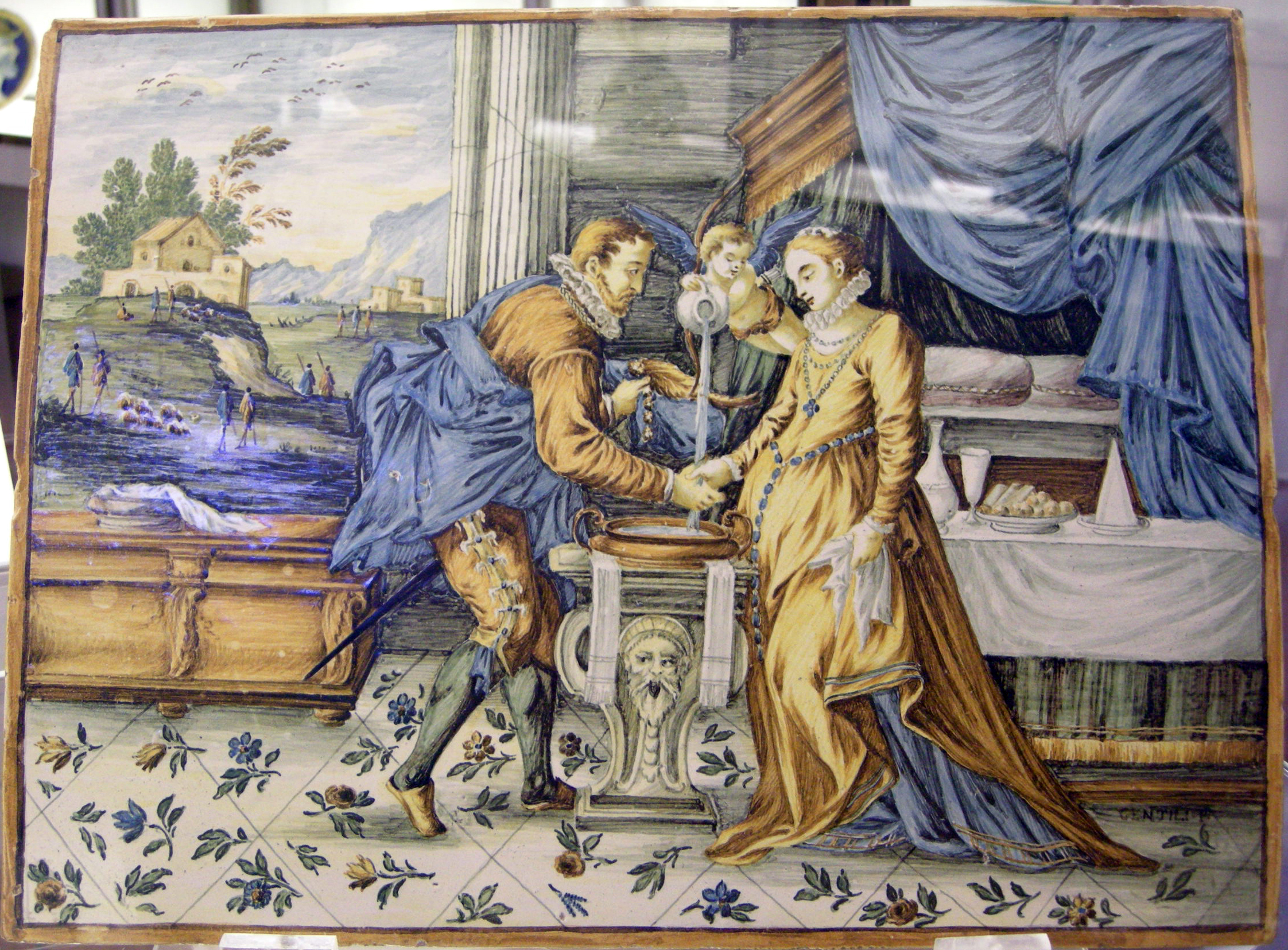 Palazzo Ducale di Urbino - Galleria Nazionale delle Marche - MIBAC This is a photo of a monument which is part of cultural heritage of Italy.